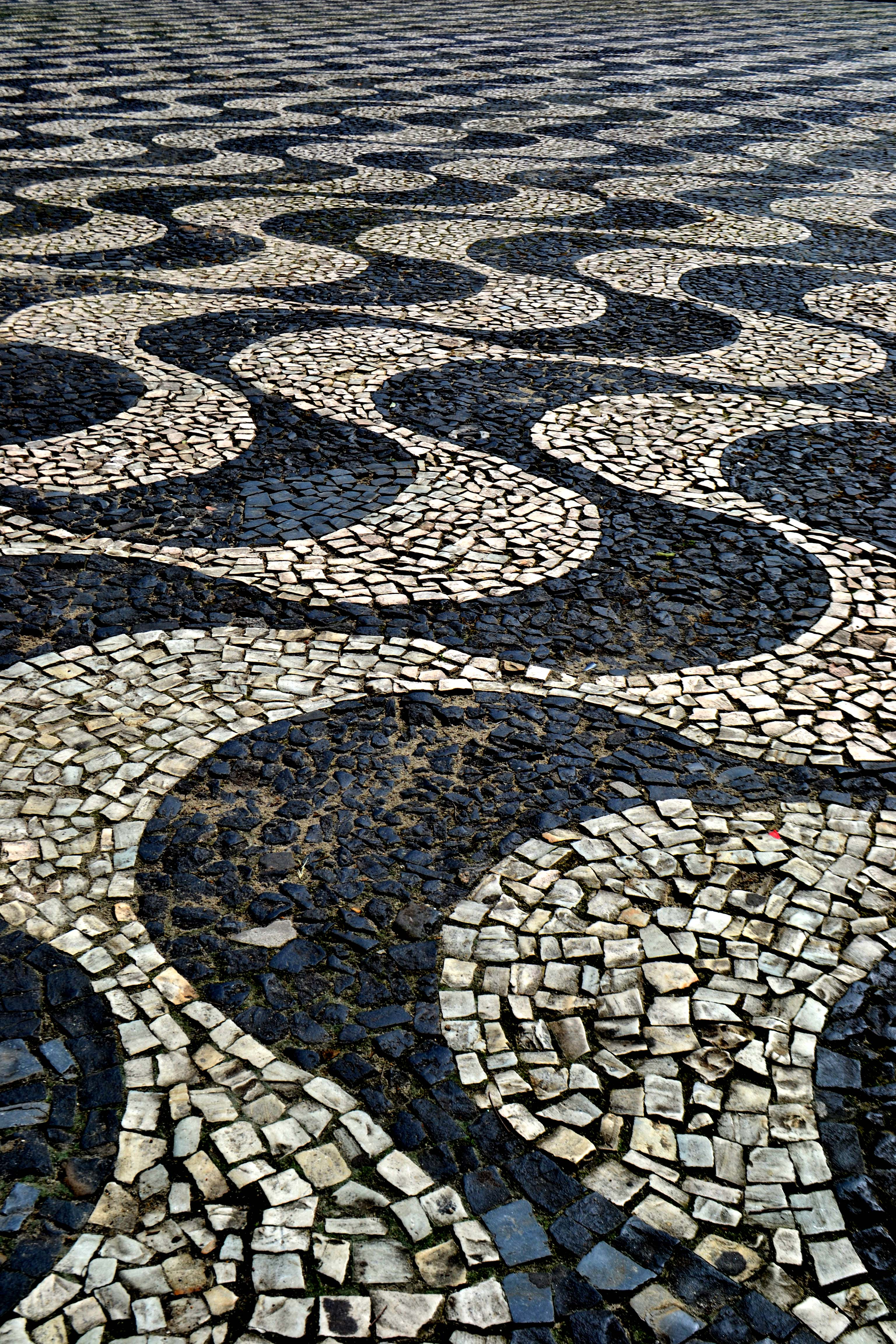 Formas que influenciaram a calçada de Copacabana, RJ, foram originadas no Amazonas, trazidas pelos Europeus no final do século XIX. Foto feita em um dos pontos turísticos de Manaus, AM, a praça do Teatro Amazonas: o Largo São Sebastião. Em Fevereiro de 2013.